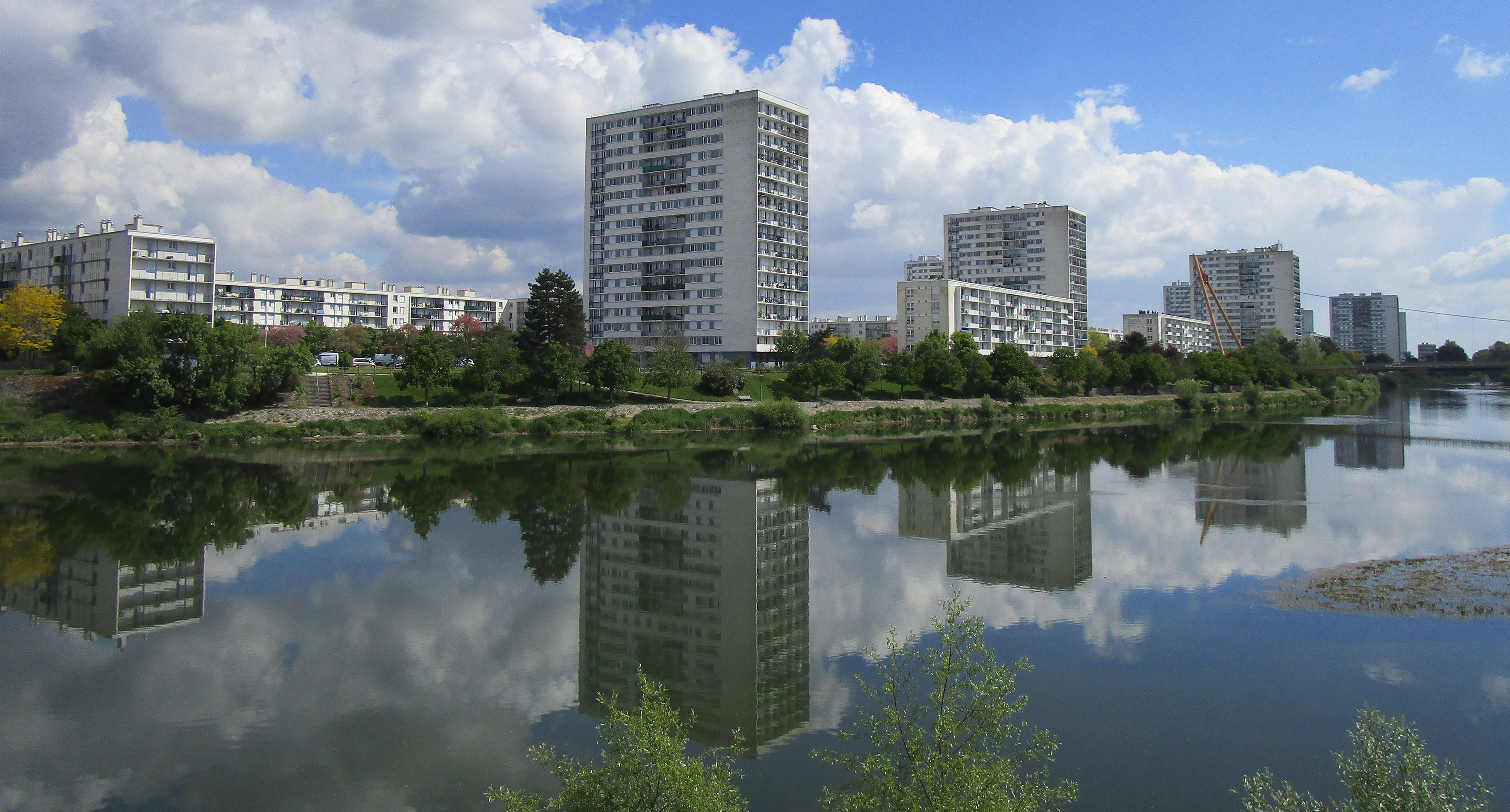 Le quartier des Rives du Cher de Tours, vu depuis les Deux-Lions.